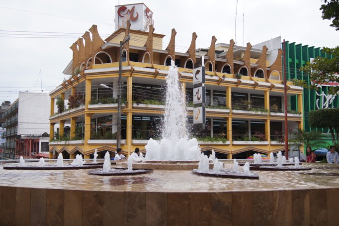 Fuente de Tantoyuca (Día)